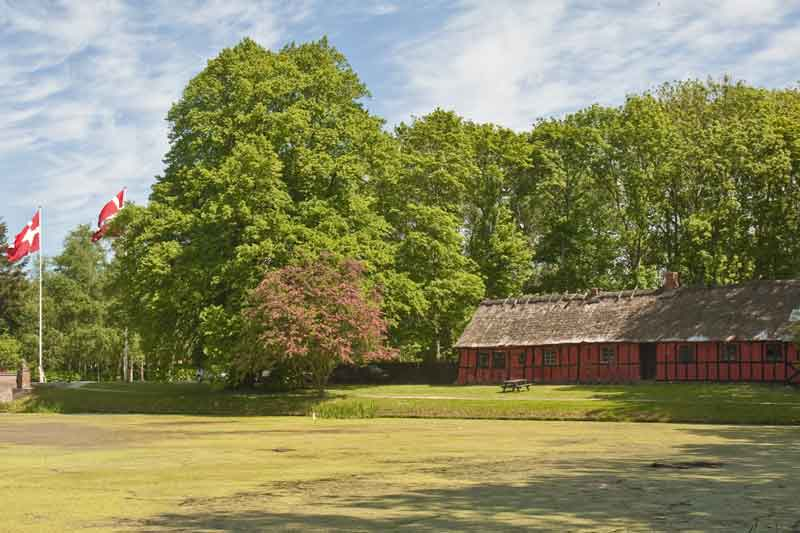 Timber framed building situated at Voergård Castle, Denmark, used in the 1700-/ 1800 century of the court instance Voer Birk./ Bindingværksbygning beliggende på Voergård Slot, Danmark, som i 1700-/ 1800 tallet blev anvendt af retsinstansen Voer Birk.